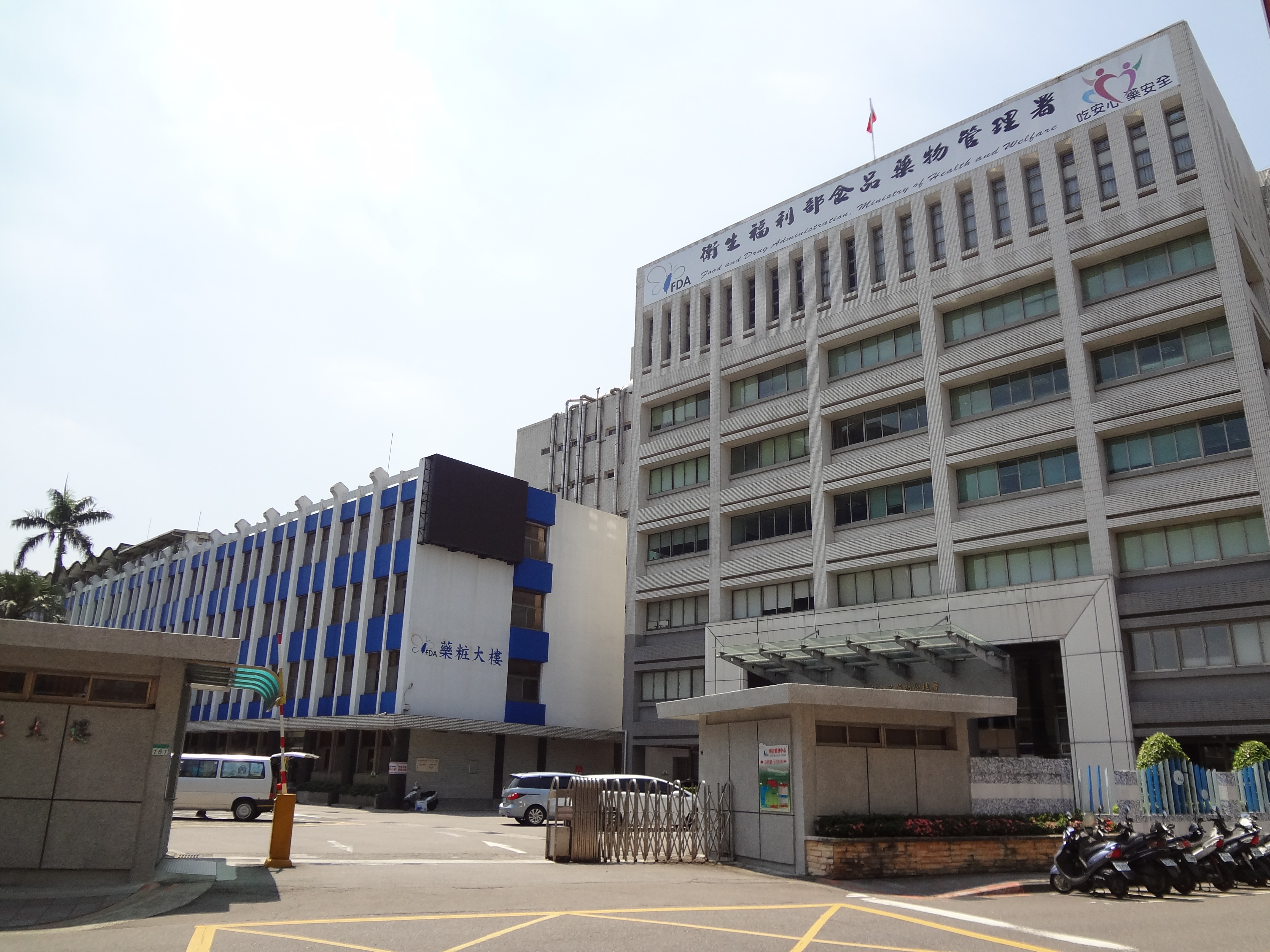 中華民國衛生福利部食品藥物管理署，昆陽辦公室（署本部）位於臺北市南港區昆陽街161之2號，藥粧辦公室位於臺北市南港區昆陽街161號（南港衛生大樓）。